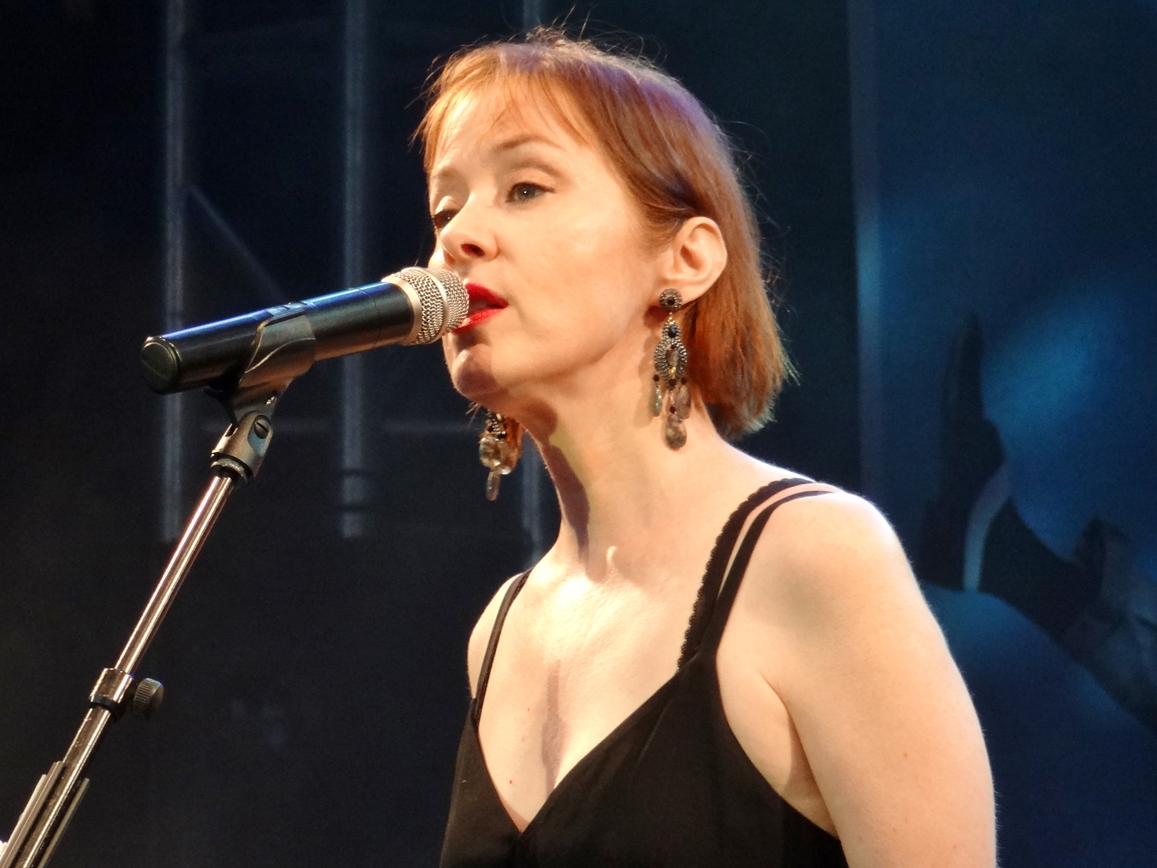 Suzanne Vega beim 13. Inselleuchten-Festival in Marienwerder, Land Brandenburg, Deutschland